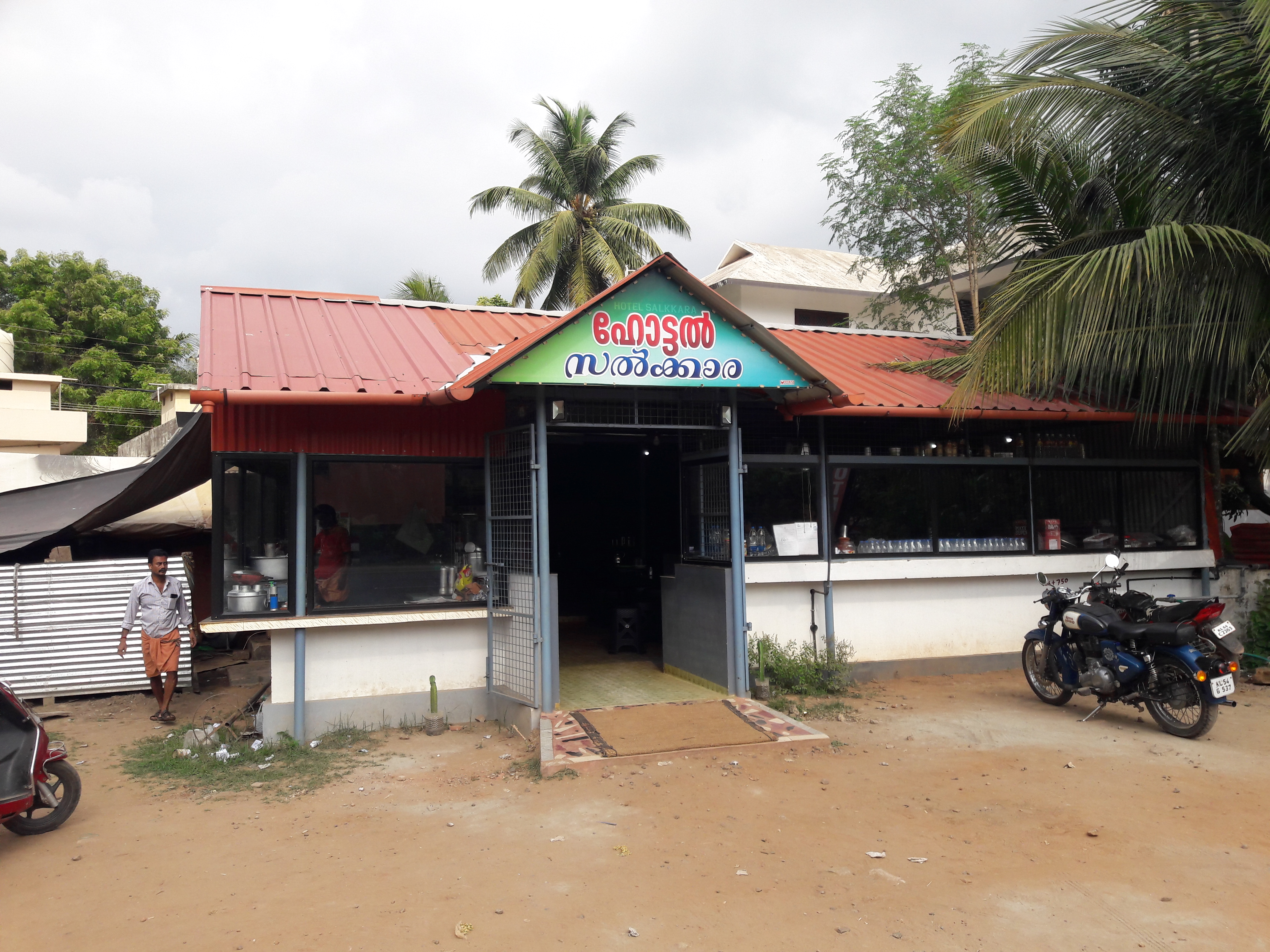 മലപ്പുറം ജില്ലയിലെ പൊന്നാനി എം ഈ എസ് കോളേജ് ഗ്രൗണ്ടിന്റെ അടുത്ത് നാഷണൽ ഹൈവേയ്ക്ക് അരികത്തുള്ള ഒരു ഹോട്ടൽ.